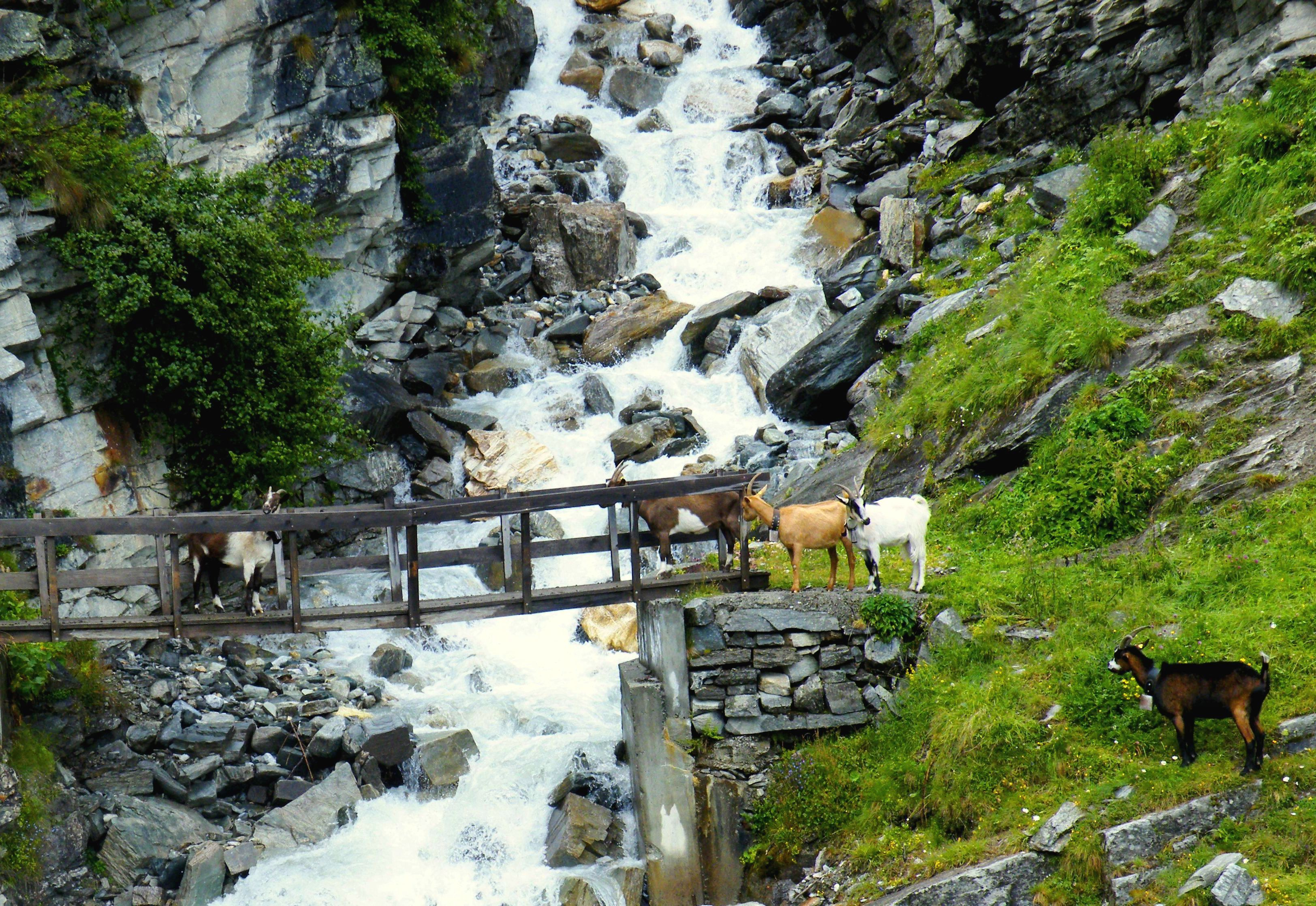 Hausziege auf dem Topali-Weg